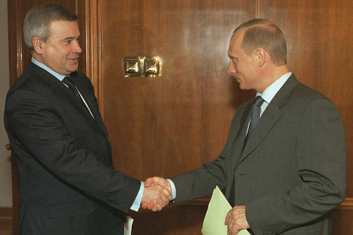 НОВО-ОГАРЕВО. С руководителем нефтяной компании «ЛУКОЙЛ» Вагитом Алекперовым.